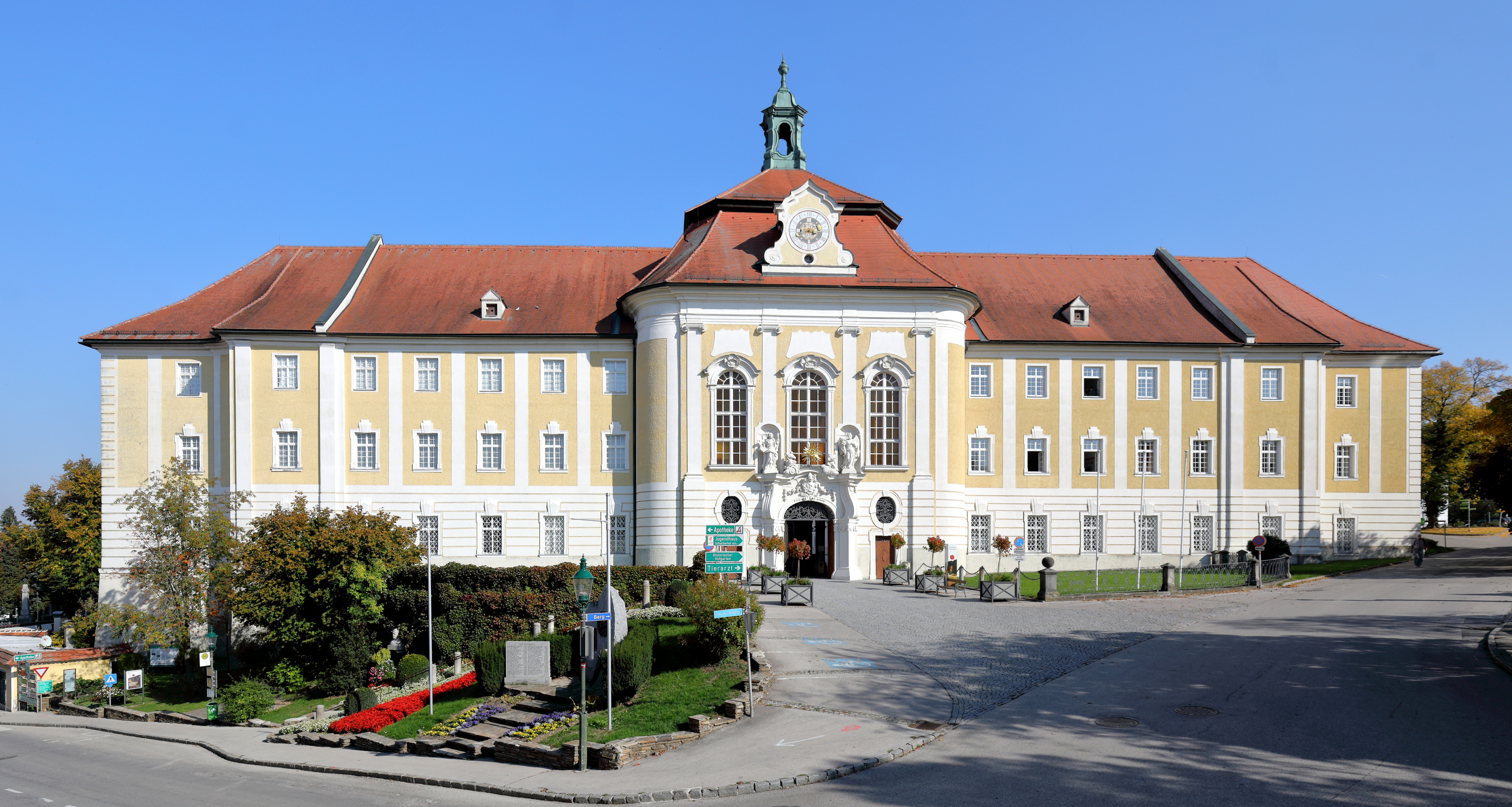 Westansicht des Benediktinerstiftes in der niederösterreichischen Marktgemeinde Seitenstetten.Das Stift ging aus einer Stiftung aus dem Jahr 1112 hervor. Die Klosteranlage wurde zwischen 1718 und 1747 zu einem 160 Meter langen „Vierkanter Gottes“ aus- und umgebaut, wobei die älteren, von der Spätromanik bis zum Frühbarock entstandenen Teile (Stiftskirche, Kreuzgang, Ritterkapelle etc.) von der mächtigen barocken Anlage umfangen bzw. in dieser aufgegangen sind. Verantwortlich für den Um- und Ausbau war der Barockbaumeister Joseph Munggenast und nach dessen Tod im Jahr 1741 führte Johann Gotthard Hayberger die Arbeiten zu Ende.